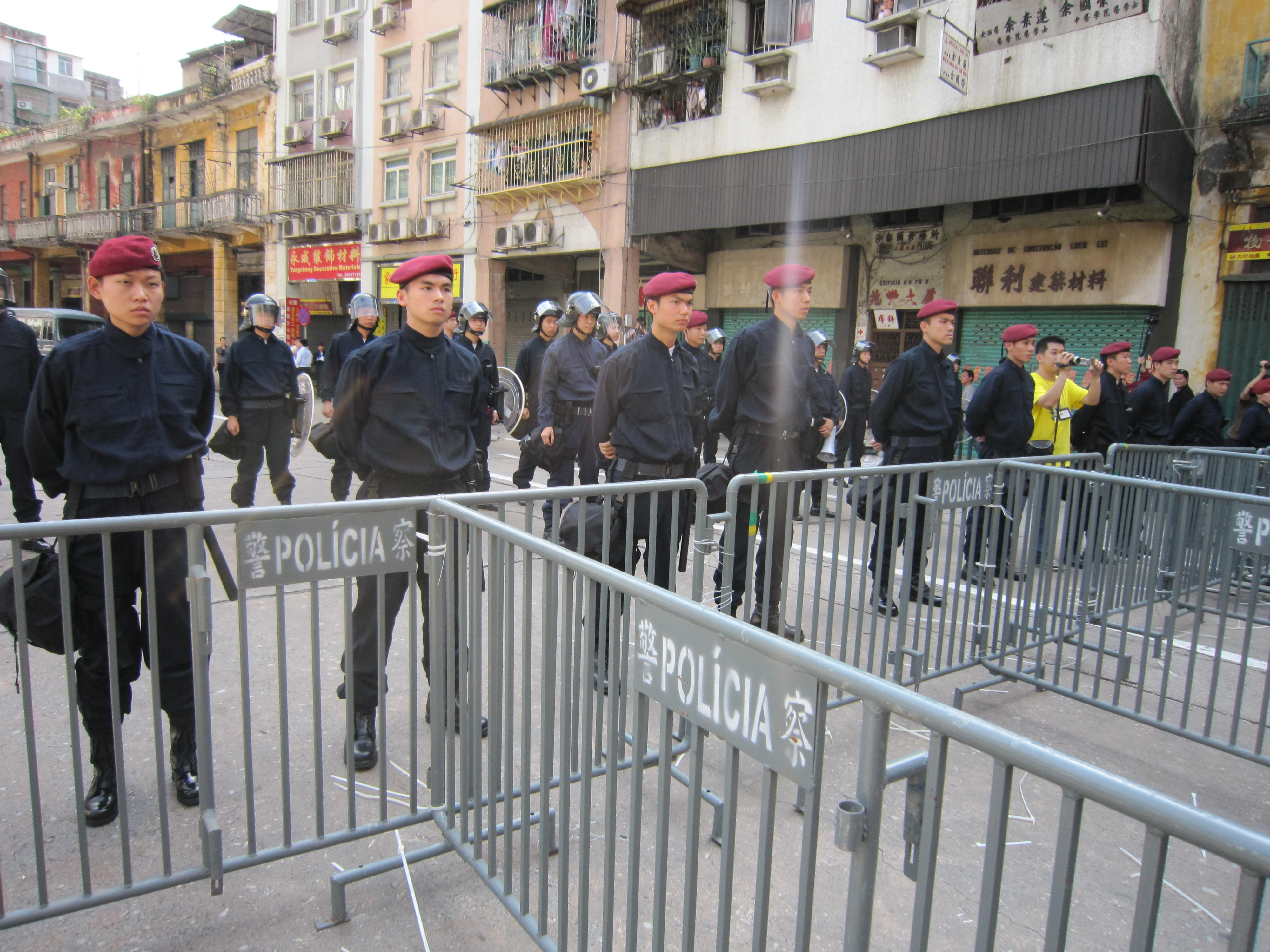 Procissão em Macau em 1 de Maio de 2010